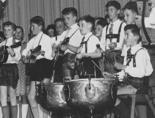 Mostrocker Gerhard Egger (Pauken) und Wilfried Scheutz(Gitarre), Bad Goisern, 1962